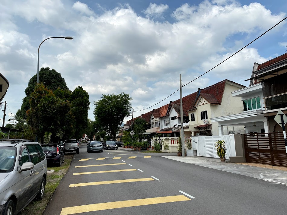 典型馬來西亞社區街景